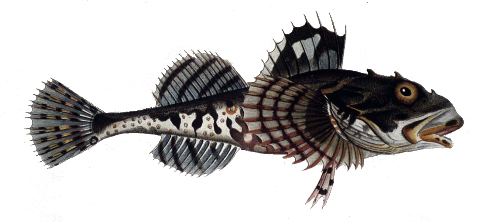 Myoxocephalus scorpius